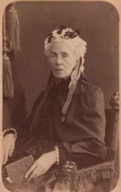 Софья Васильевна Римская-Корсакова (1802—1890), ур. Скарятина.